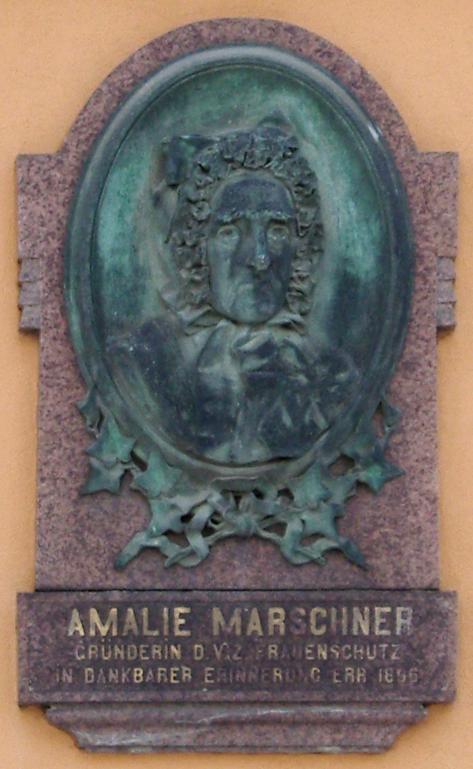 Gedenktafel für Amalie Marschner (1794-1883) in der Georgstraße in Dresden